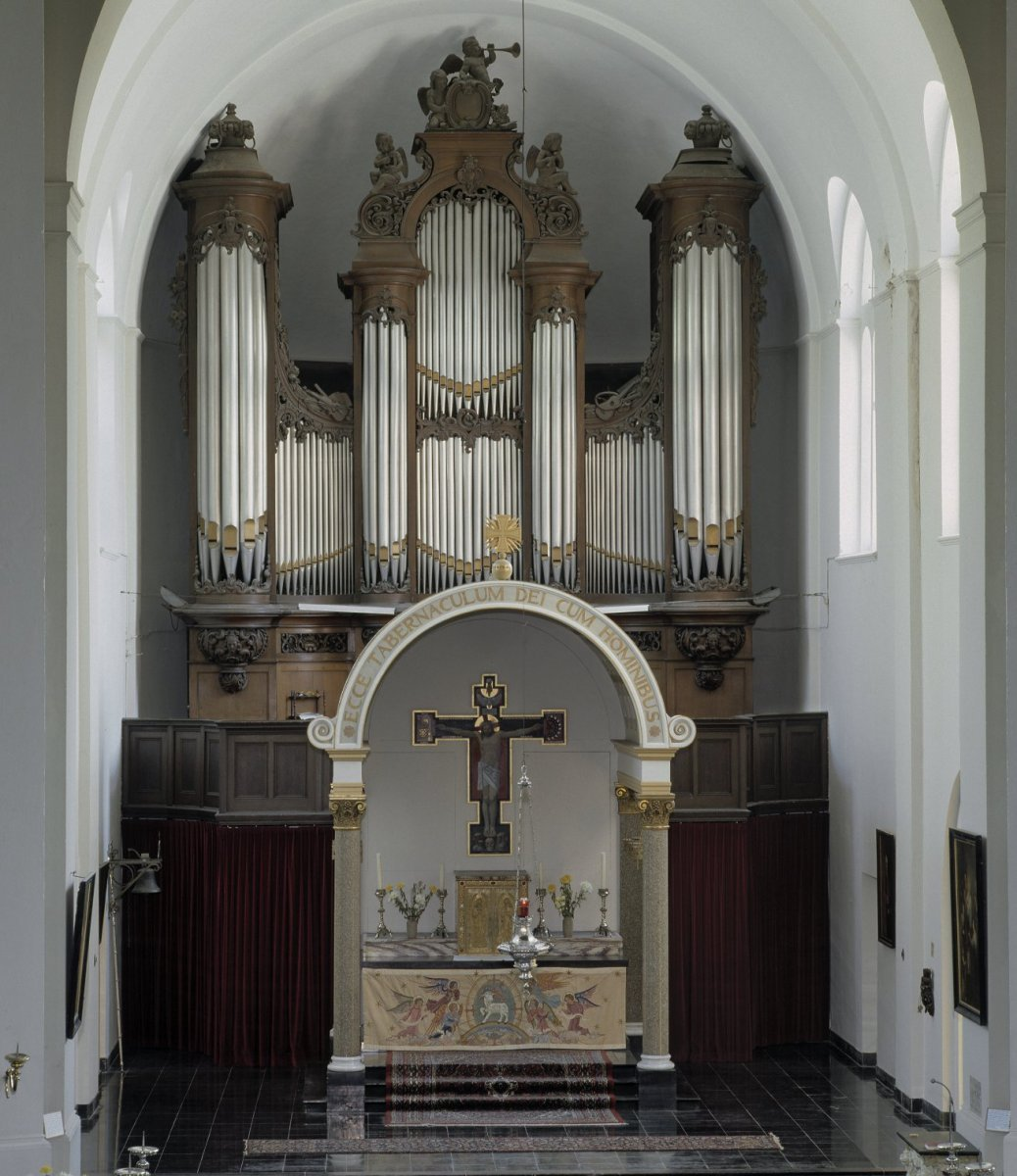 Sint Catharinakerk: Interieur, aanzicht orgel, orgelnummer 667 (opmerking: Gefotografeerd voor Het Historische Orgel in Nederland 1850-1858)